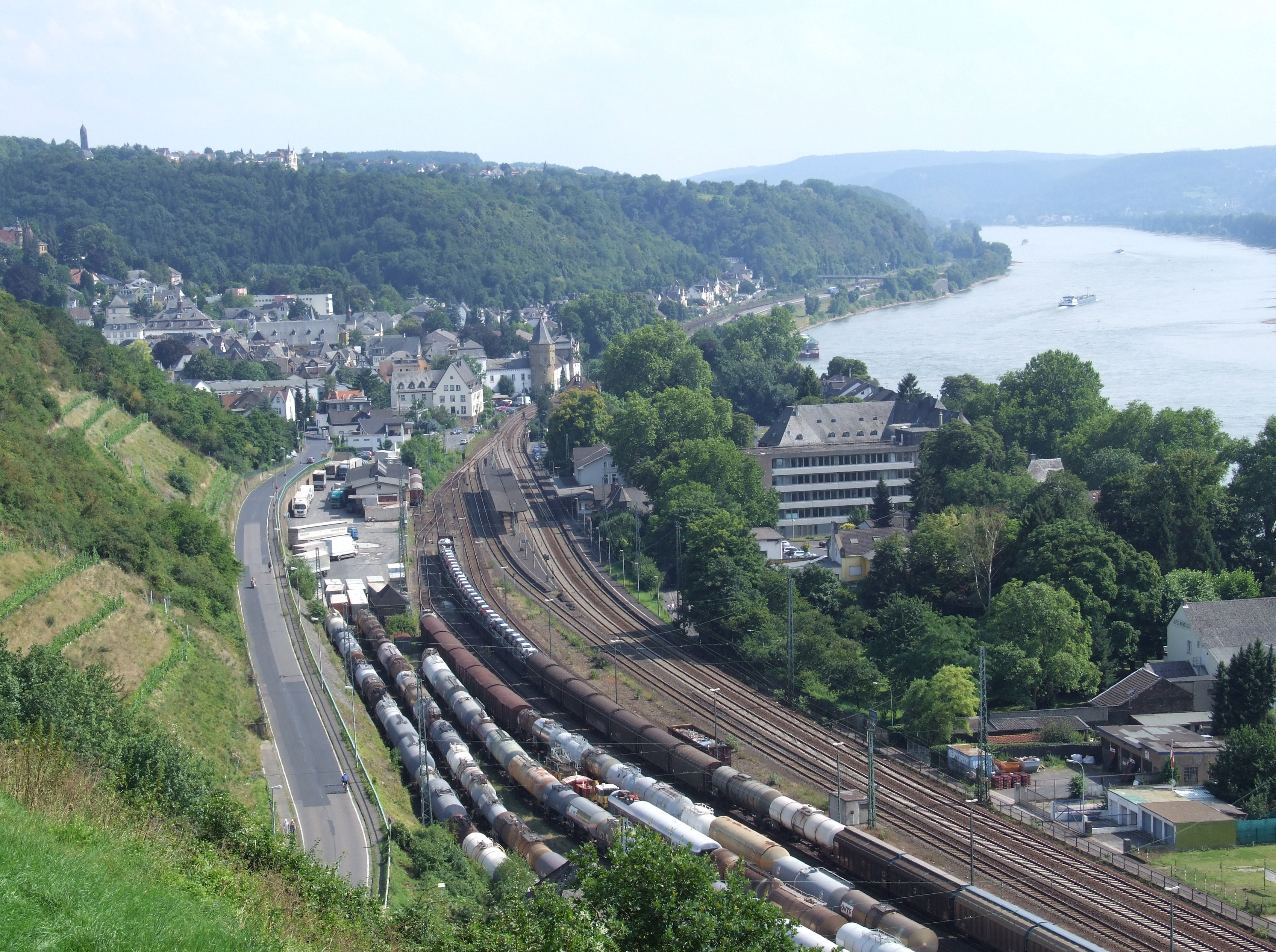 Blick auf Linz am Rhein und Dattenburg von Burg Ockenfels aus